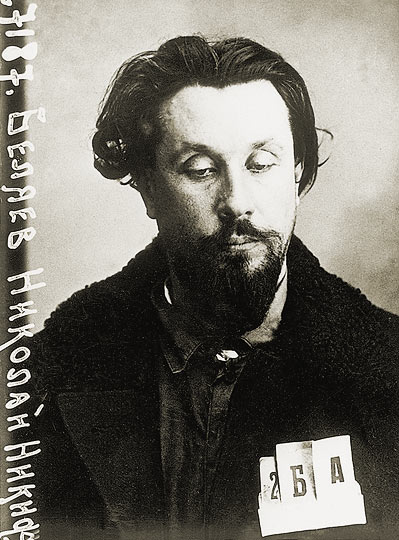 Епископ Варнава (Н.Н.Беляев). Фото из следственного дела. Москва, Лубянка. Март 1933